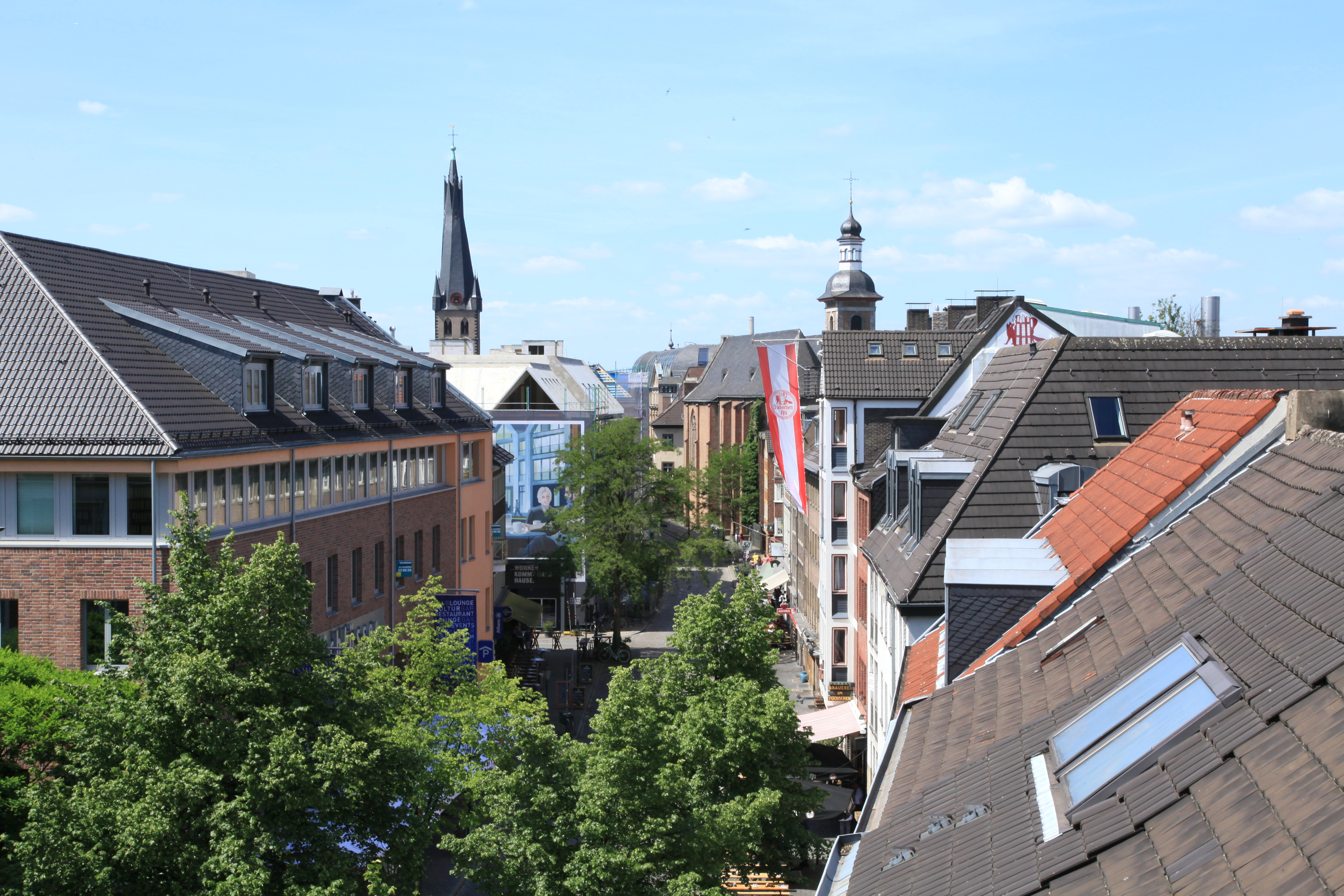 Blick vom Parkhaus Ratinger Tor zu Kreuzherrenkirche und St. Lambertus hinter der Ratinger Straße in Düsseldorf